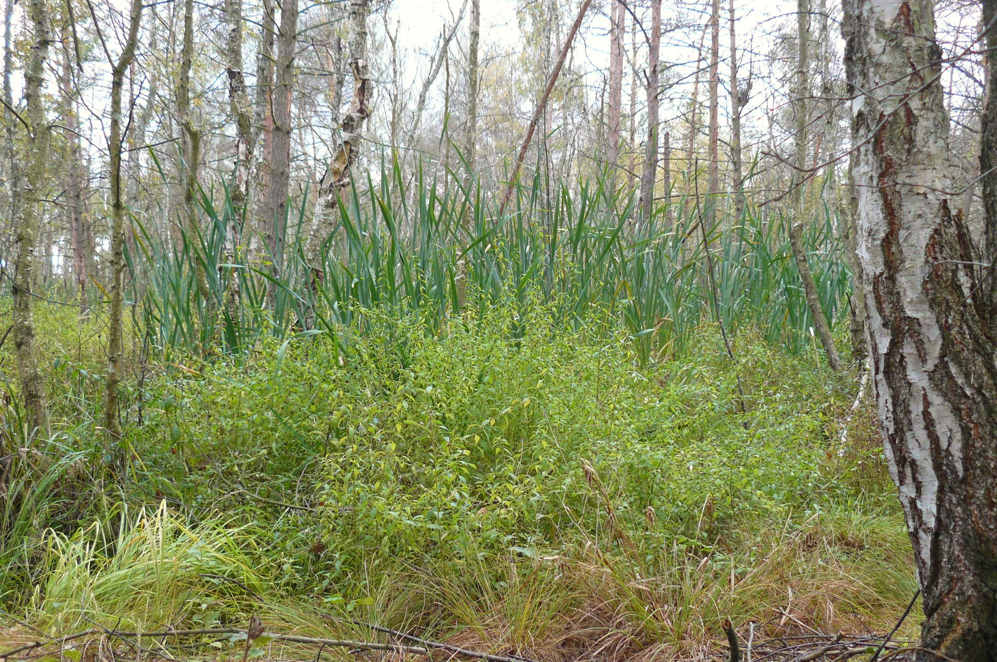 Bagno Chlebowo - tereny podmokłe.